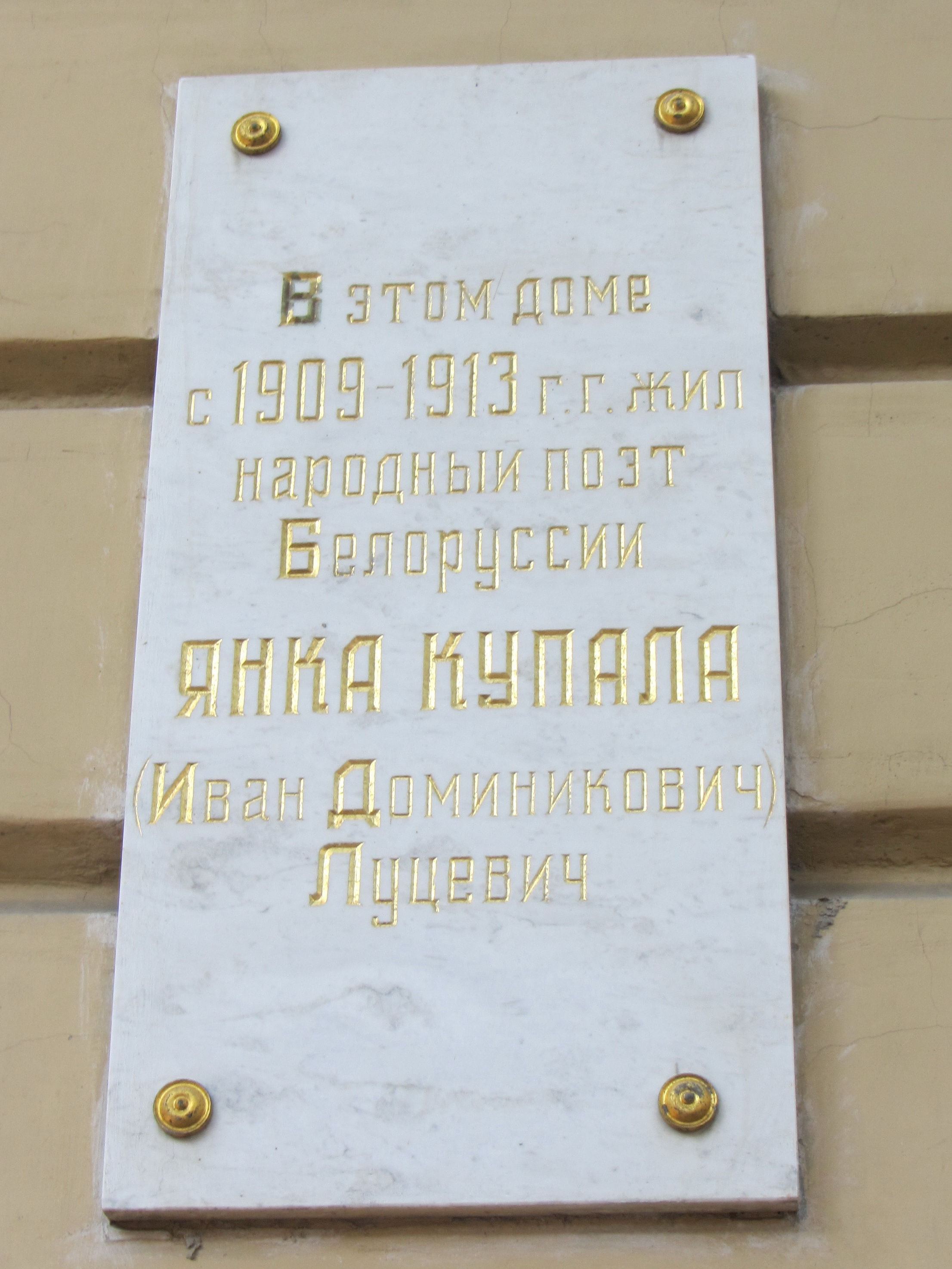 Беларуская (тарашкевіца): Памятная дошка на доме нумар 45 на 4-й лініі Васільеўскага вострава, Санкт Пецярбург. Тут месьцілася шасьціпакаёвая кватэра беларускага навукоўца Браніслава Эпімаха-Шыпілы, у ёй у Пецярбурскі пэрыяд жыў паэт Янка Купала, месьцілася рэдакцыя выдавецтва Загляне сонца і ў наша аконца.